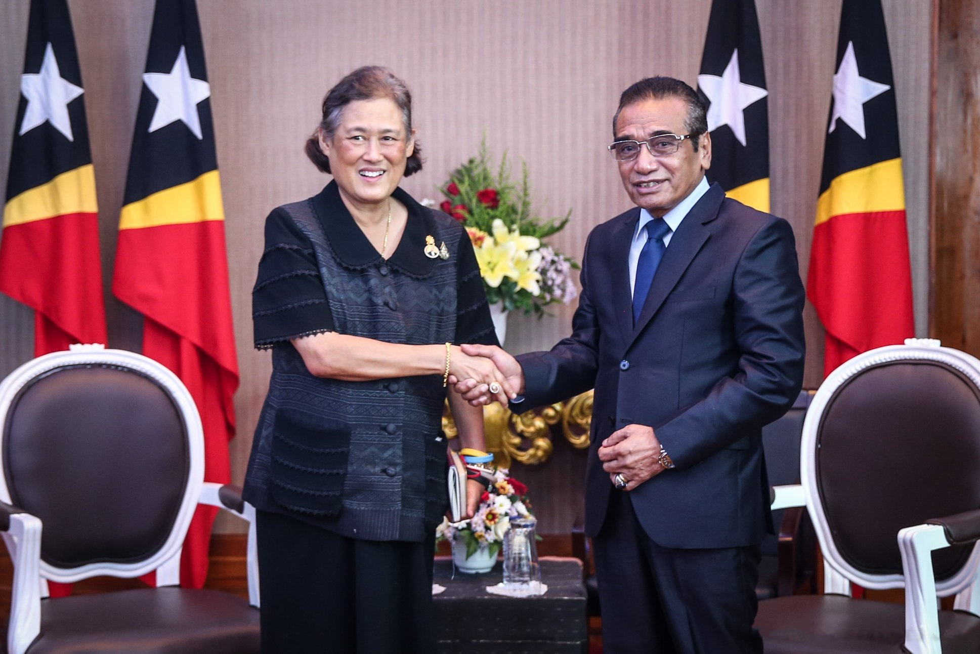 Maha Chakri Sirindhorn zu Besuch bei Francisco Guterres